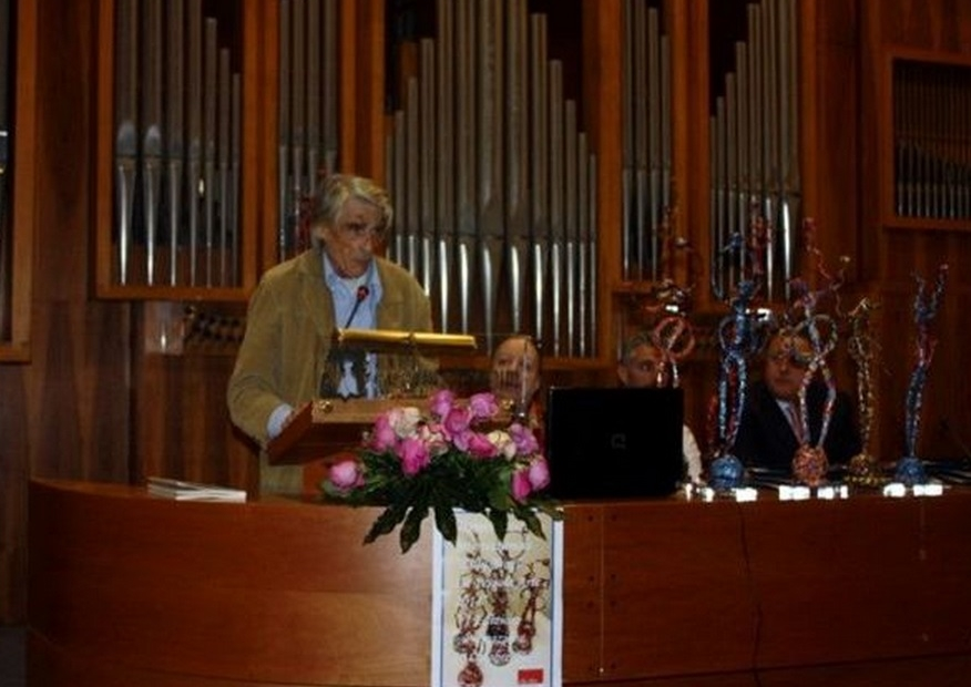 Il critico letterario Rodolfo Tommasi presenta la premiazione del Concorso letterario "Lilly Brogi La PergolaArte" 2014 VI Edizione